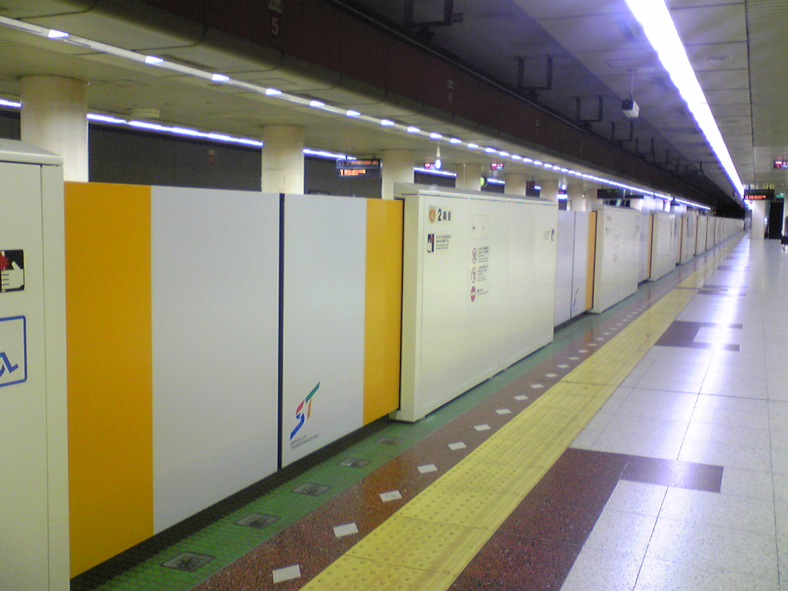 札幌市営地下鉄東西線南郷7丁目駅4番ホームの可動式ホーム柵